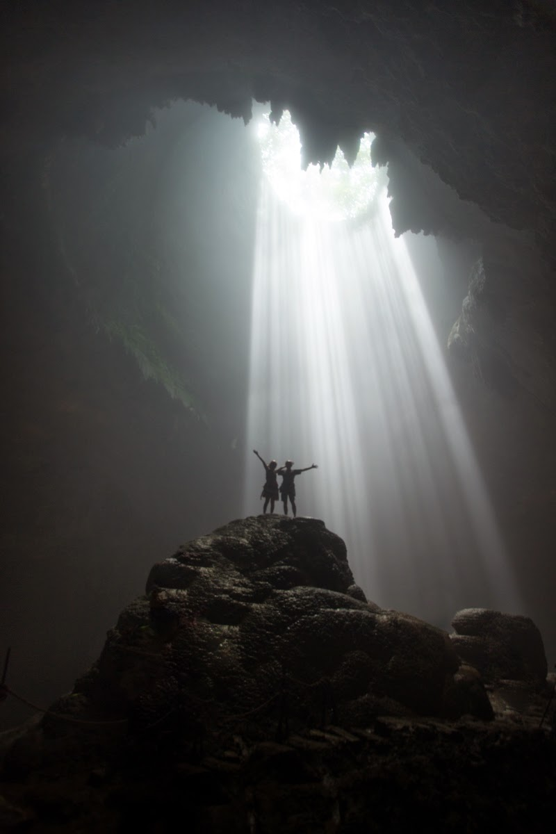 "Cahaya surga" Goa Jomblang